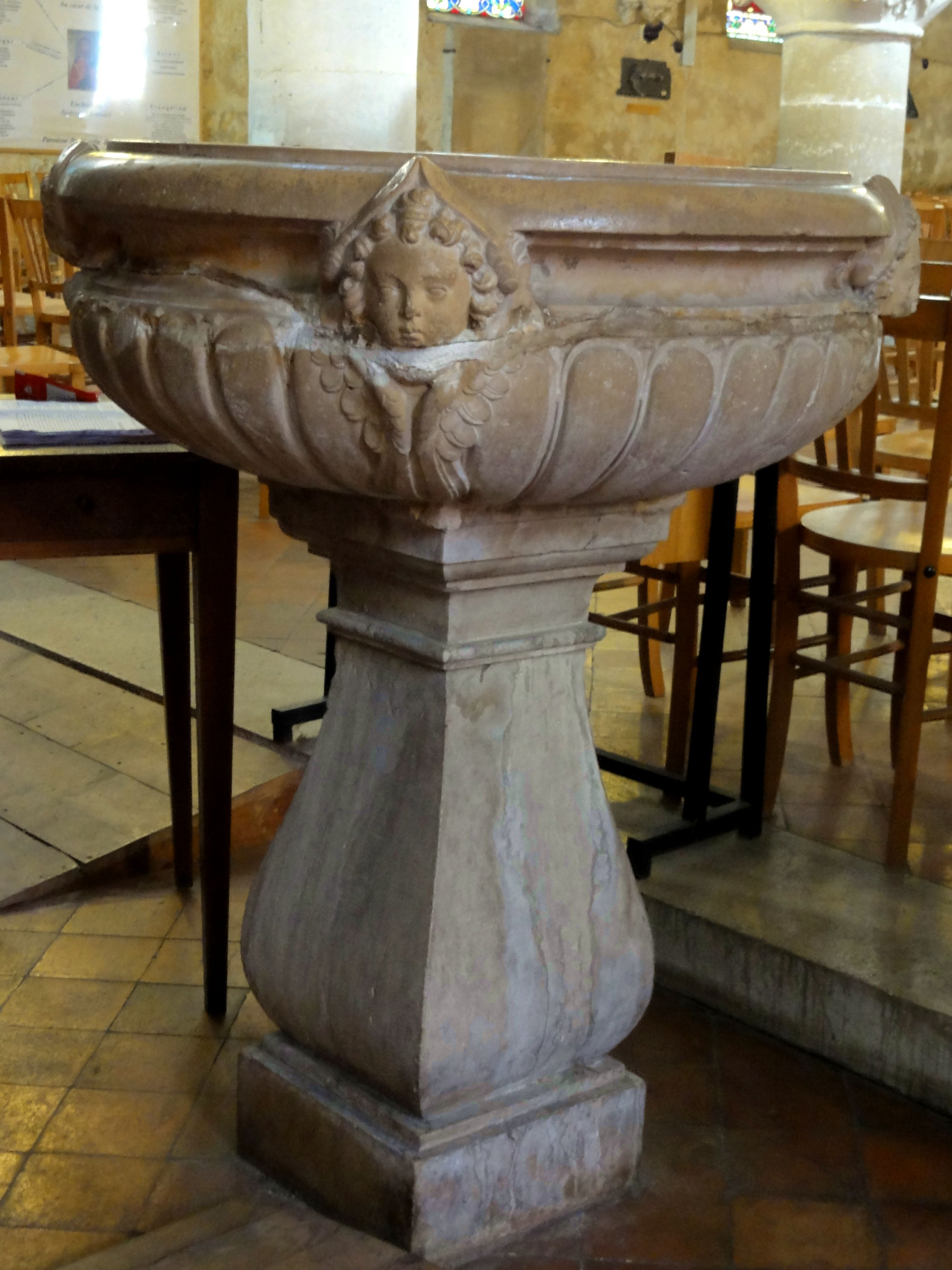 Fonts baptismaux. Classés monument historique en tant que bénitier, date : 1627.